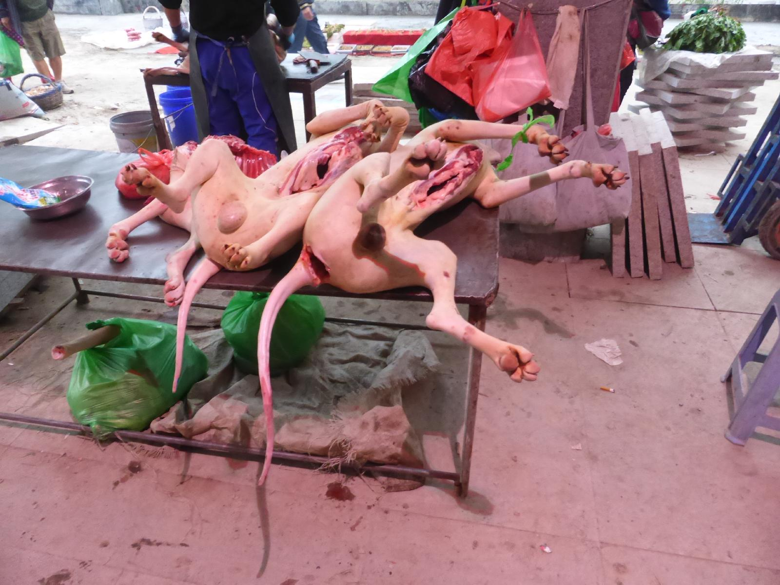 延辺朝鮮族自治州の朝市 犬の内臓が処理されている